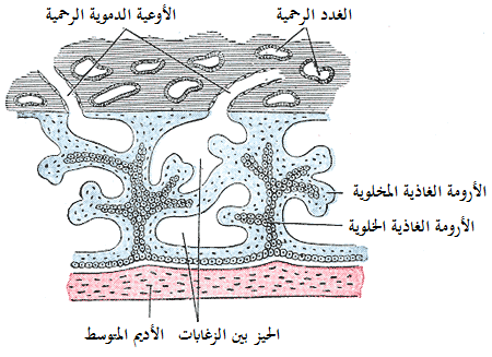 رسم توضيحي للزغابات المشيمية الأولية